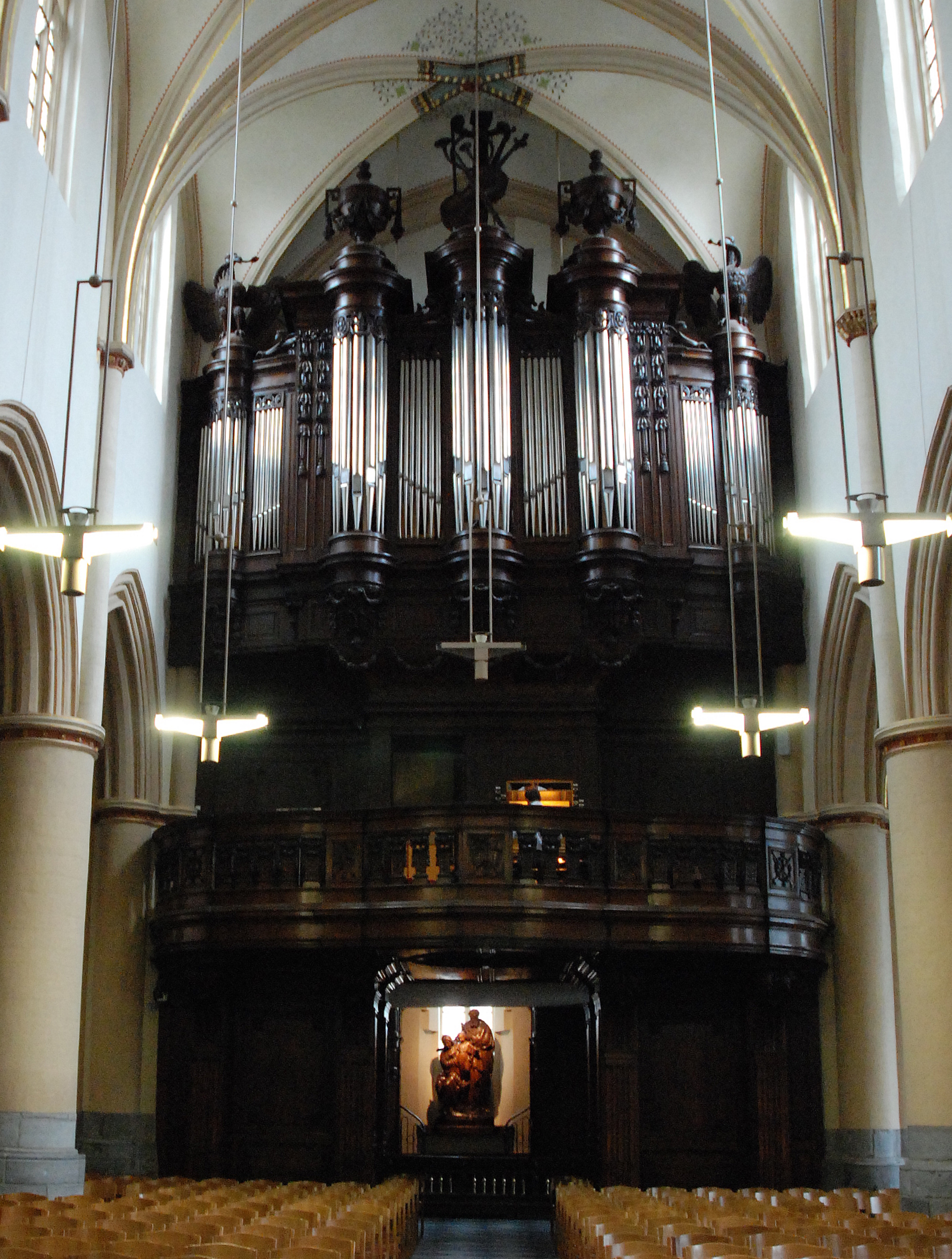 kerkorgel Quintinus - eigen foto